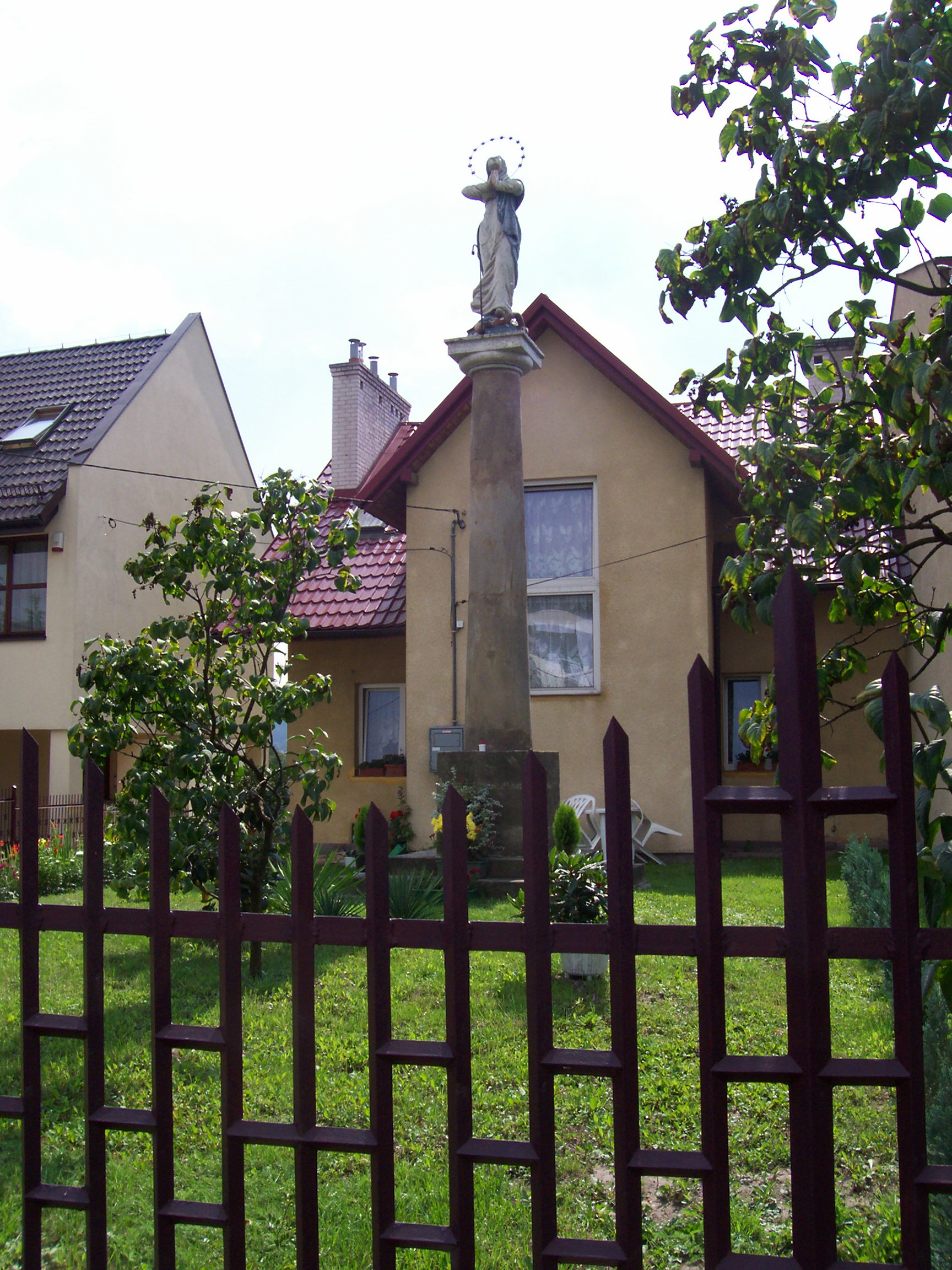 Dawny pręgierz krakowski, przeniesiony w XIX w. do wsi Mydlniki (dziś część Krakowa). Obecnie kolumna pod figurą Matki Boskiej.